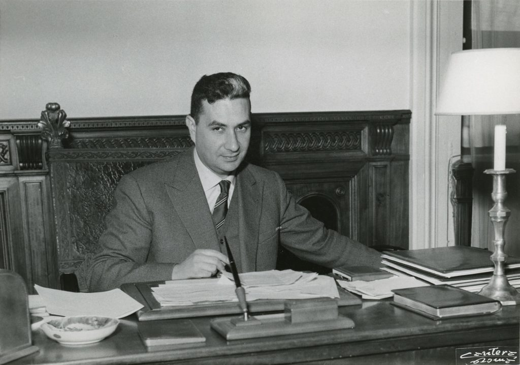 Aldo Moro appena eletto segretario nazionale della Democrazia Cristiana